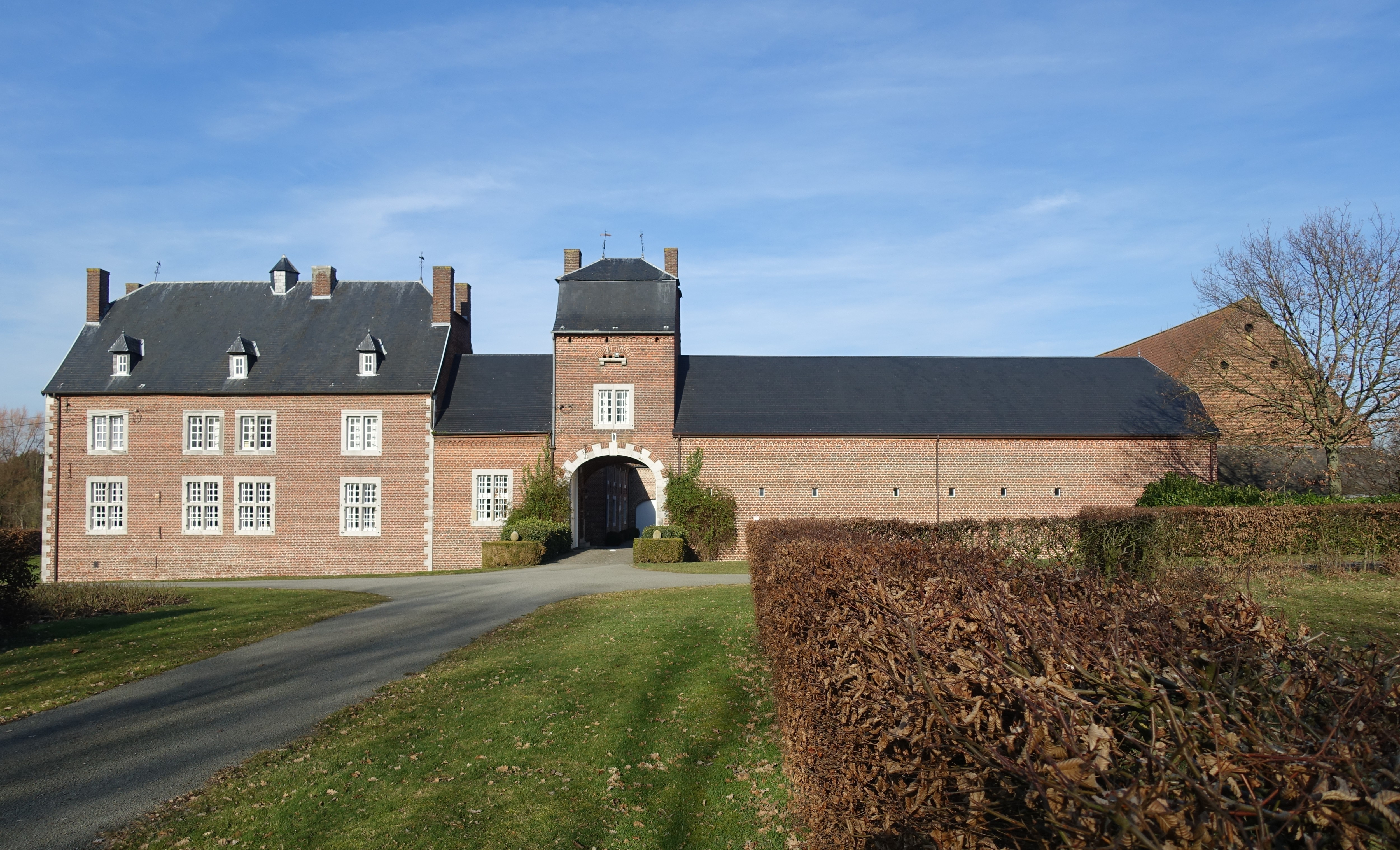 Kasteelhoeve van Nieuwerkerken (Limburg). Gesloten en vroeger omgrachte hoeve, uit de 17de en 18de eeuw Bakstenen gebouwen gegroepeerd rondom het rechthoekig erf. Met poortgebouw met duifhuis. Beschermd monument